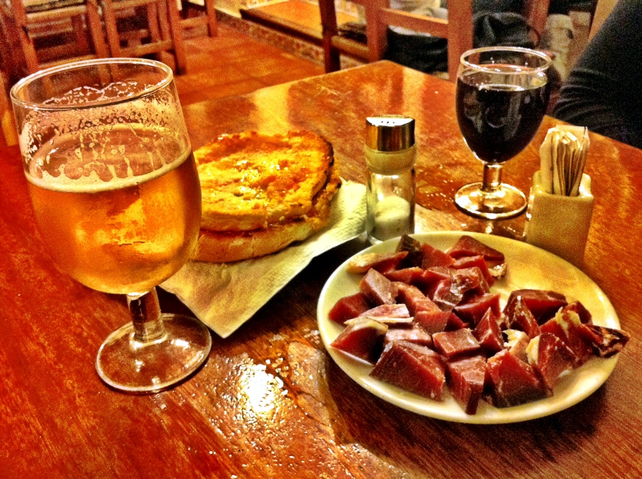 Plato de tacos de jamón, pan con tomate, vino y cerveza, en un bar de Ibiza.